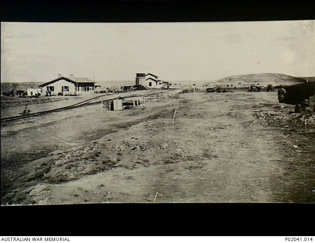 מסילת הרכבת מואדי צראר לקוסיימה - תחנת הרכבת ליד תל א-שריעה